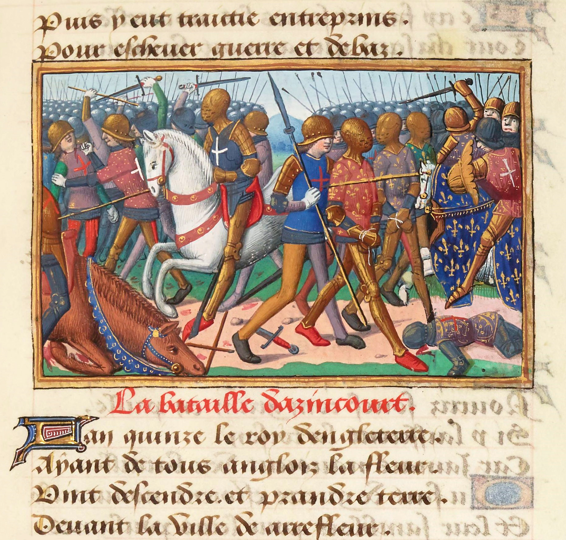 Bataille d'Azincourt (1415).